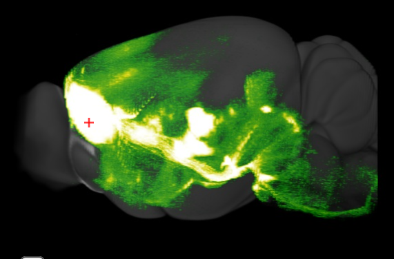 眼窩前頭皮質AAV-GFPの３D